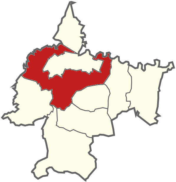 Gmina Oświęcim w powiecie oświęcimskim